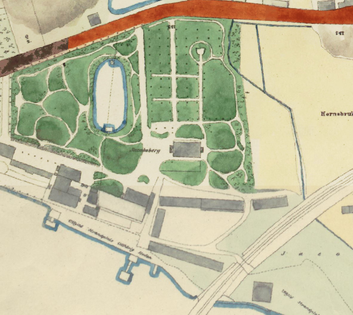 Del av Stockholmskartan visande Jakobsbergs malmgård vid Hornstull